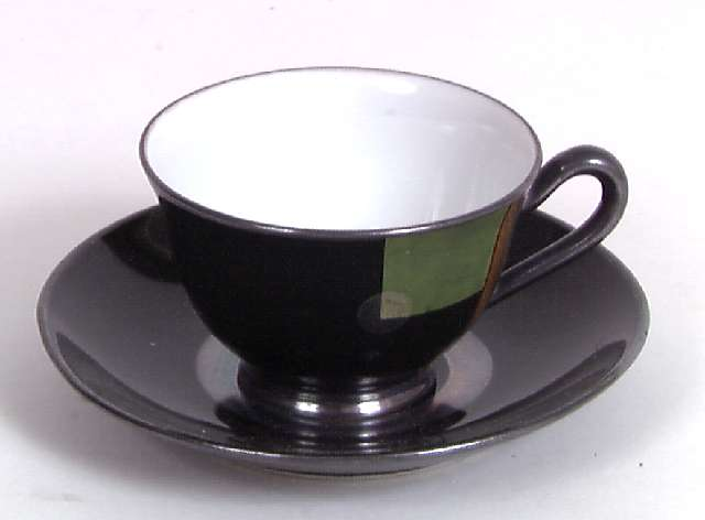 Mokkakopp med skål podusert på Porsgrund Porselensfabrik omkring 1929. Foto Anne-Lise Reinsfelt, Norsk Folkemuseum, Nf.1982-1066AB.